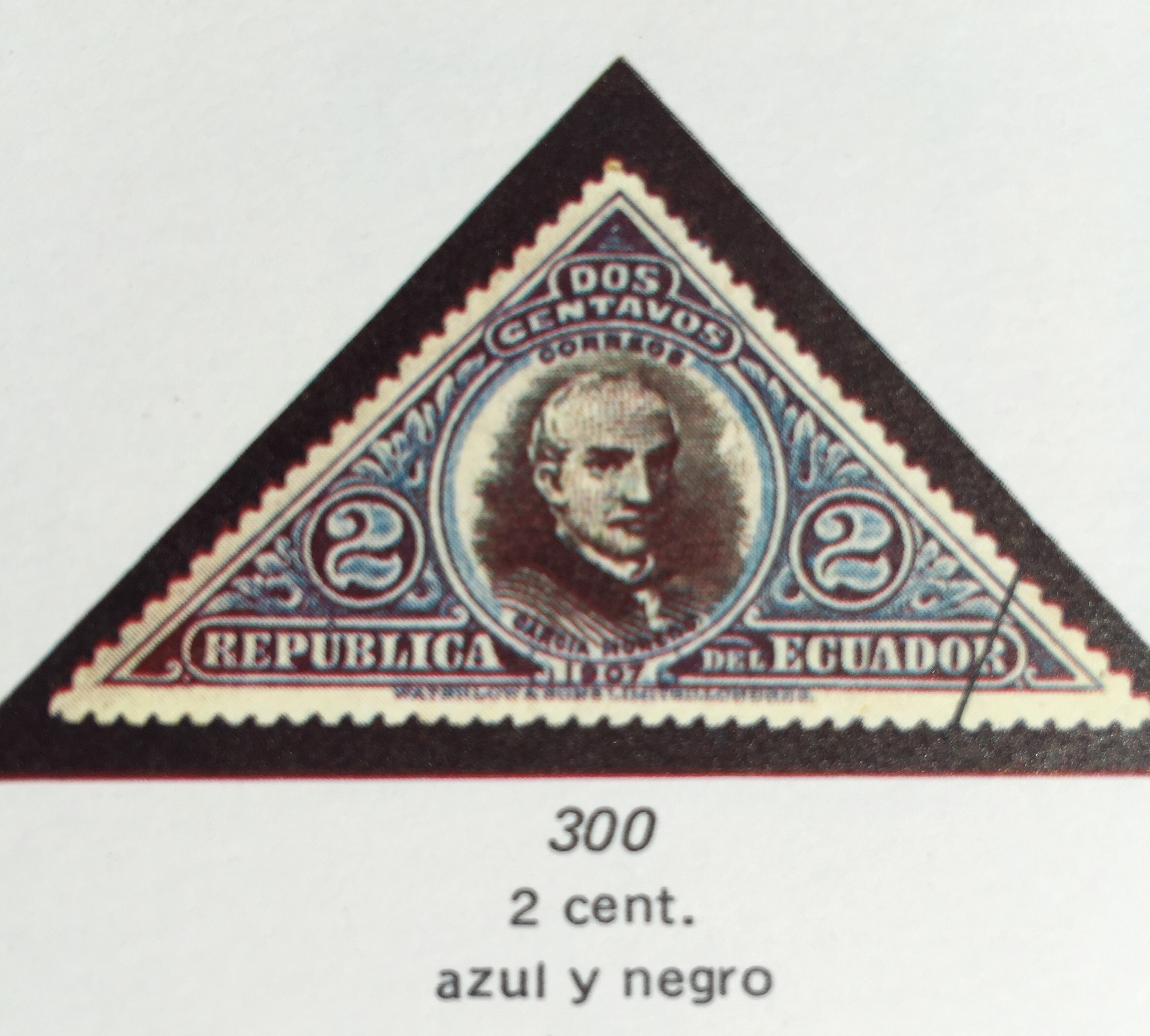 Estampilla de 2 centavos con imagen del Presidente Gabriel García Moreno.